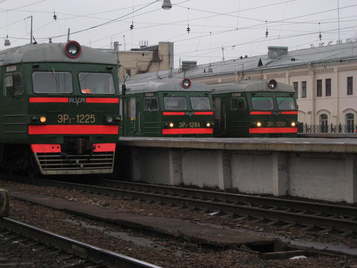 ЭР2-1225, ЭР2-1284 и ЭР2-1291 на перроне Финляндского вокзала, Санкт-Петербург